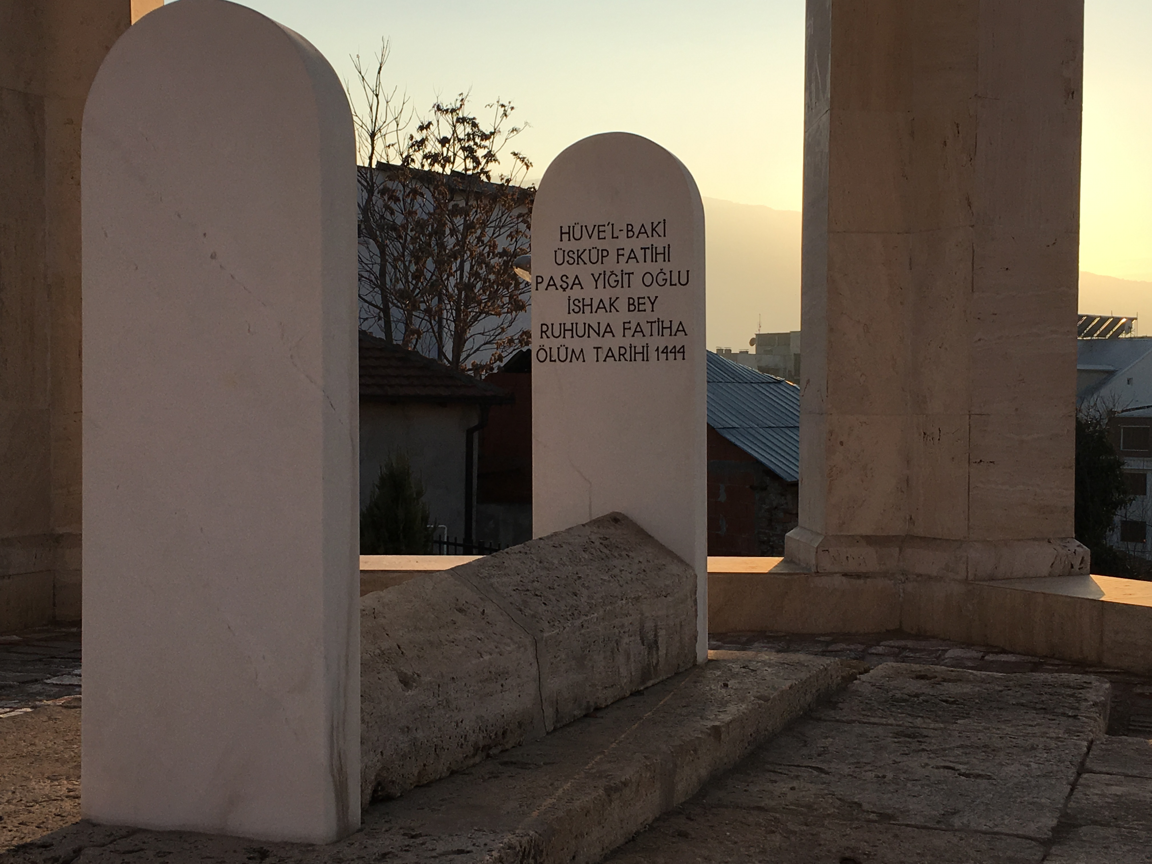 Гробот ба Исхак-бег во Скопје